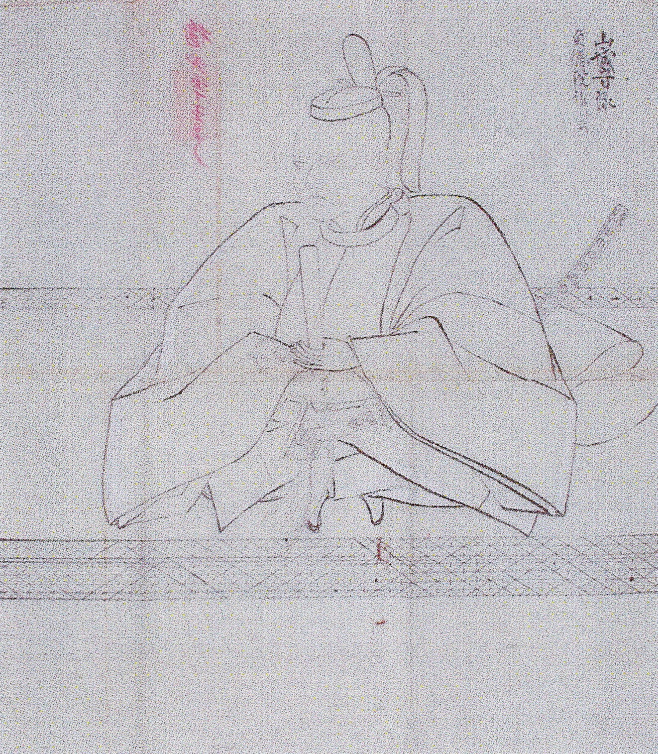 加賀八家横山氏5代当主・横山任風の肖像画粉本。